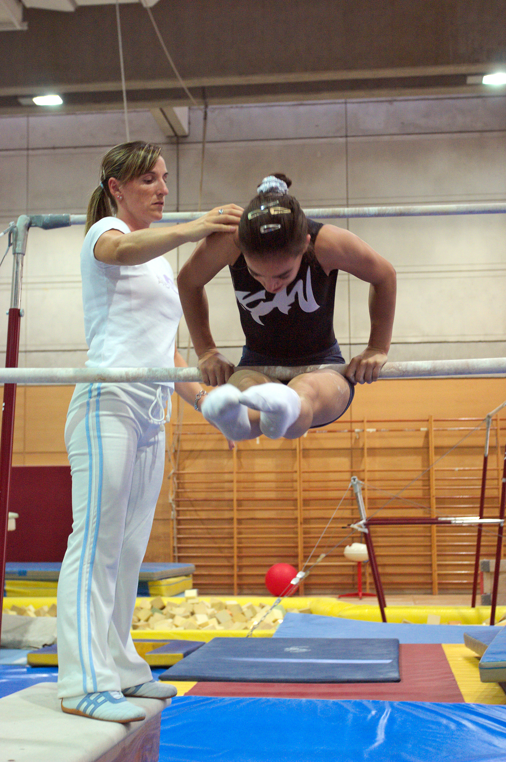 La gimnasta Tania Gener con la entrenadora Eva Rueda en el CAR de Madrid el 15 de septiembre de 2004.